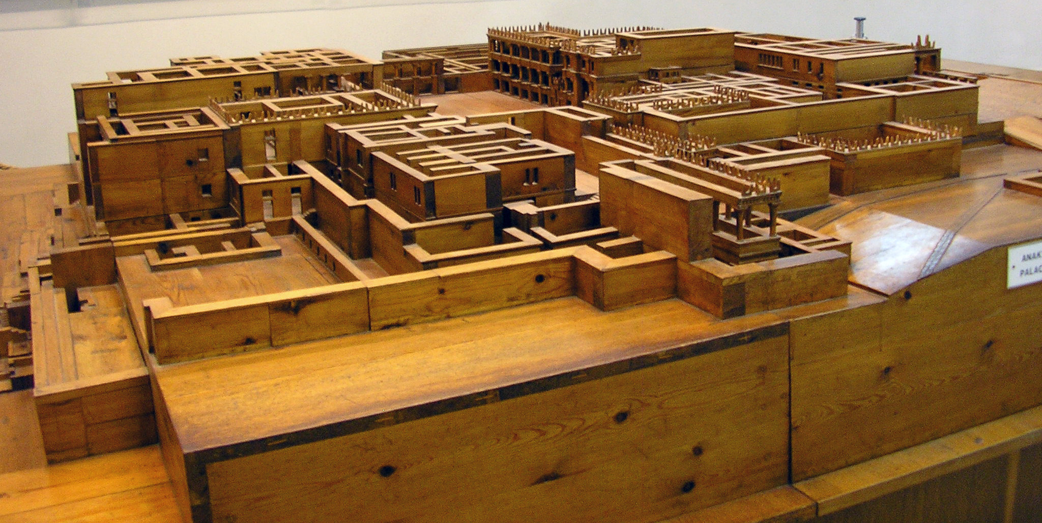 Дерев'яна реконструкція первинного вигляду палацу Кносс, що експонується в Іракліонському археологічному музеї